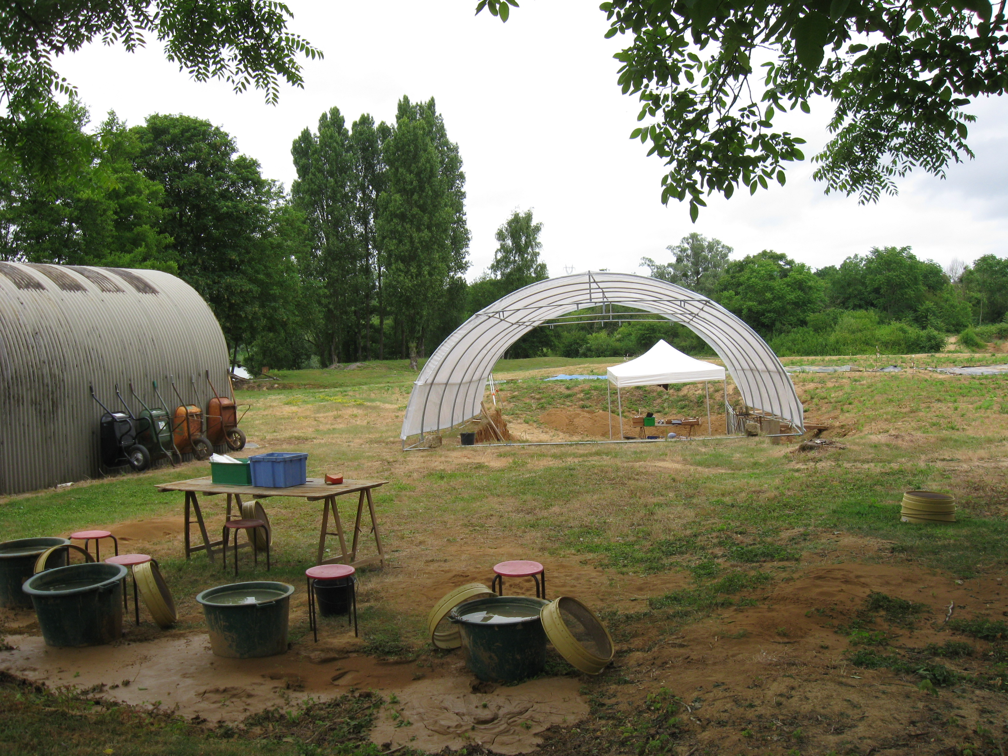 Site archéologique de Pincevent. (commune de La Grande-Paroisse, Seine-et-Marne, région Île-de-France).